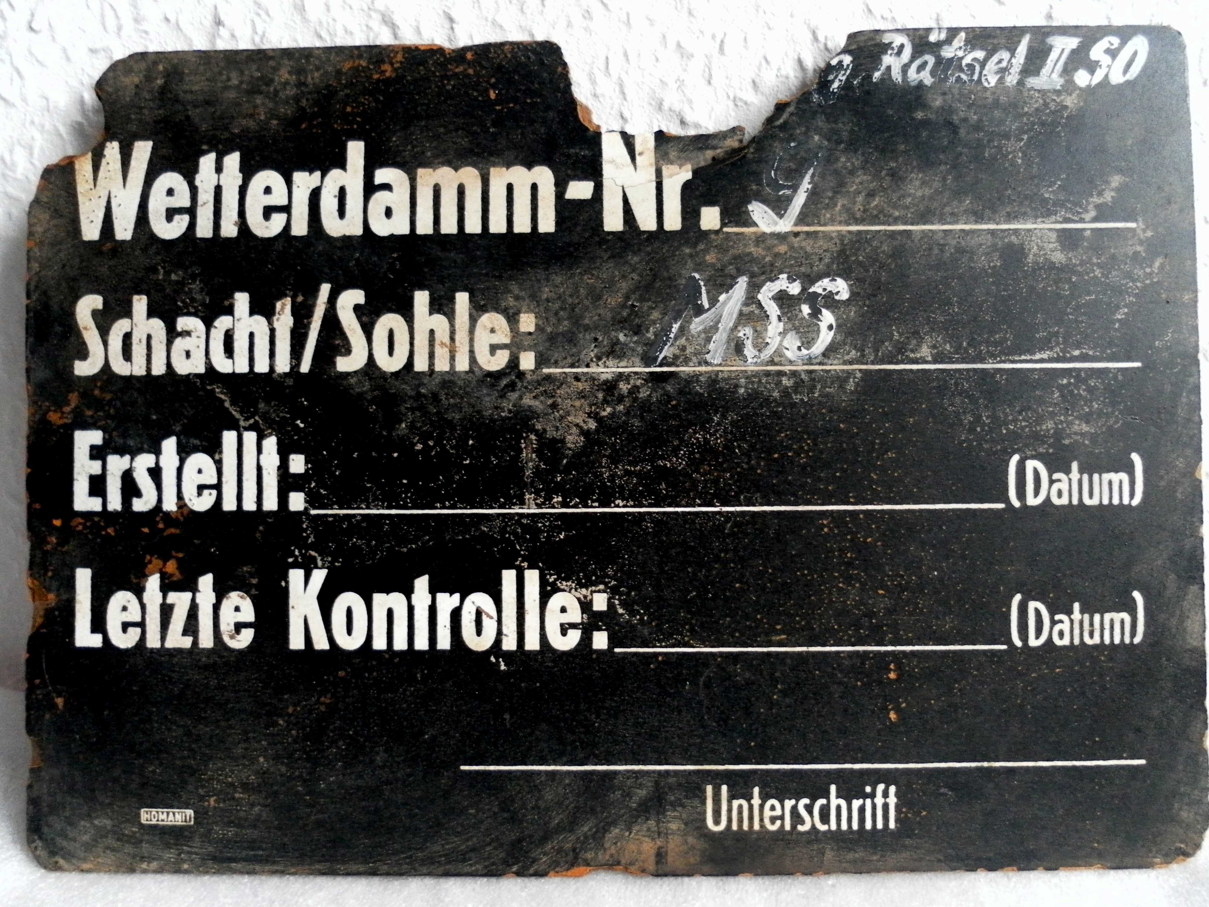 Wettertafel aus dem Objekt 02 (SDAG WISMUT) Wetterdamm-Nr. 9 Sohle: Marx-Semler-Stollnsohle Gang: Rätsel II SO Revier: Niederschlehma